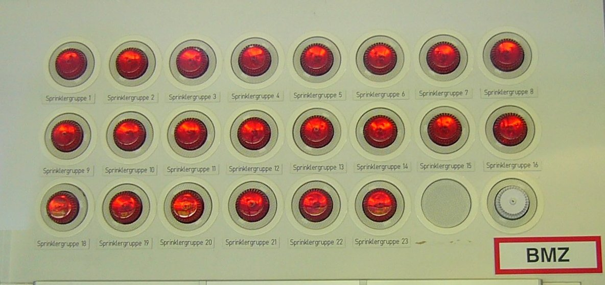 Tableau einer Sprinkleranlage